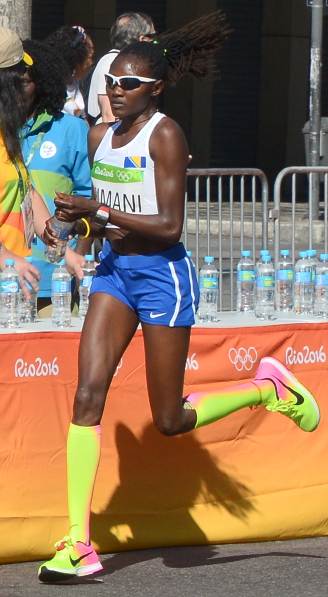 Passage du marathon des jeux olympiques de Rio 2016 dans le centre de Rio